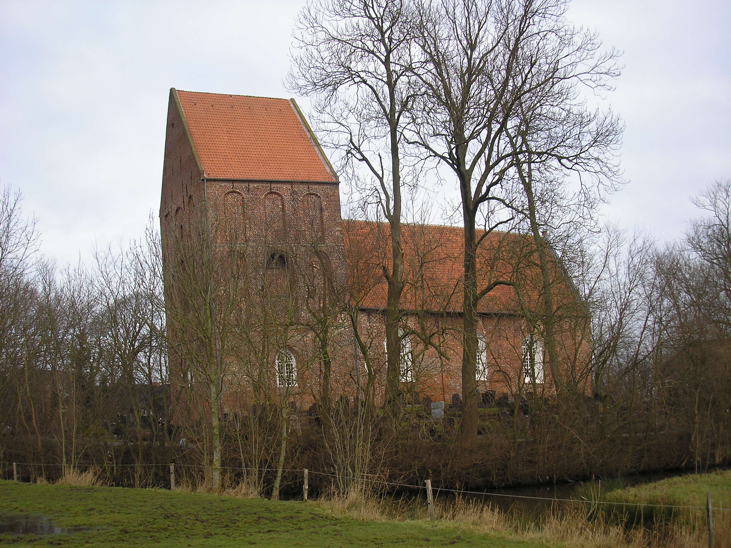 Schiefer Turm von Suurhusen